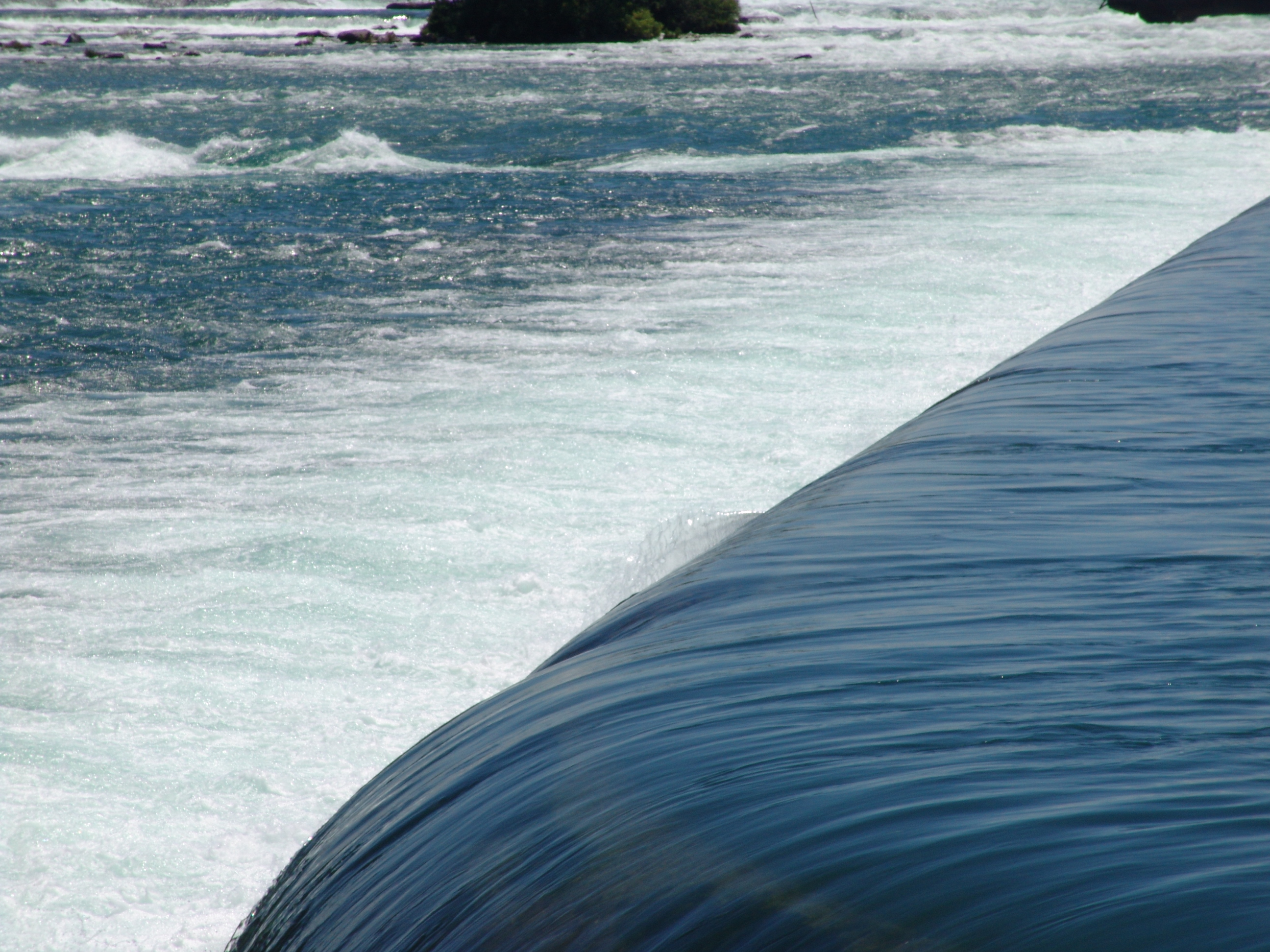 Rand van één van de Niagarawatervallen.